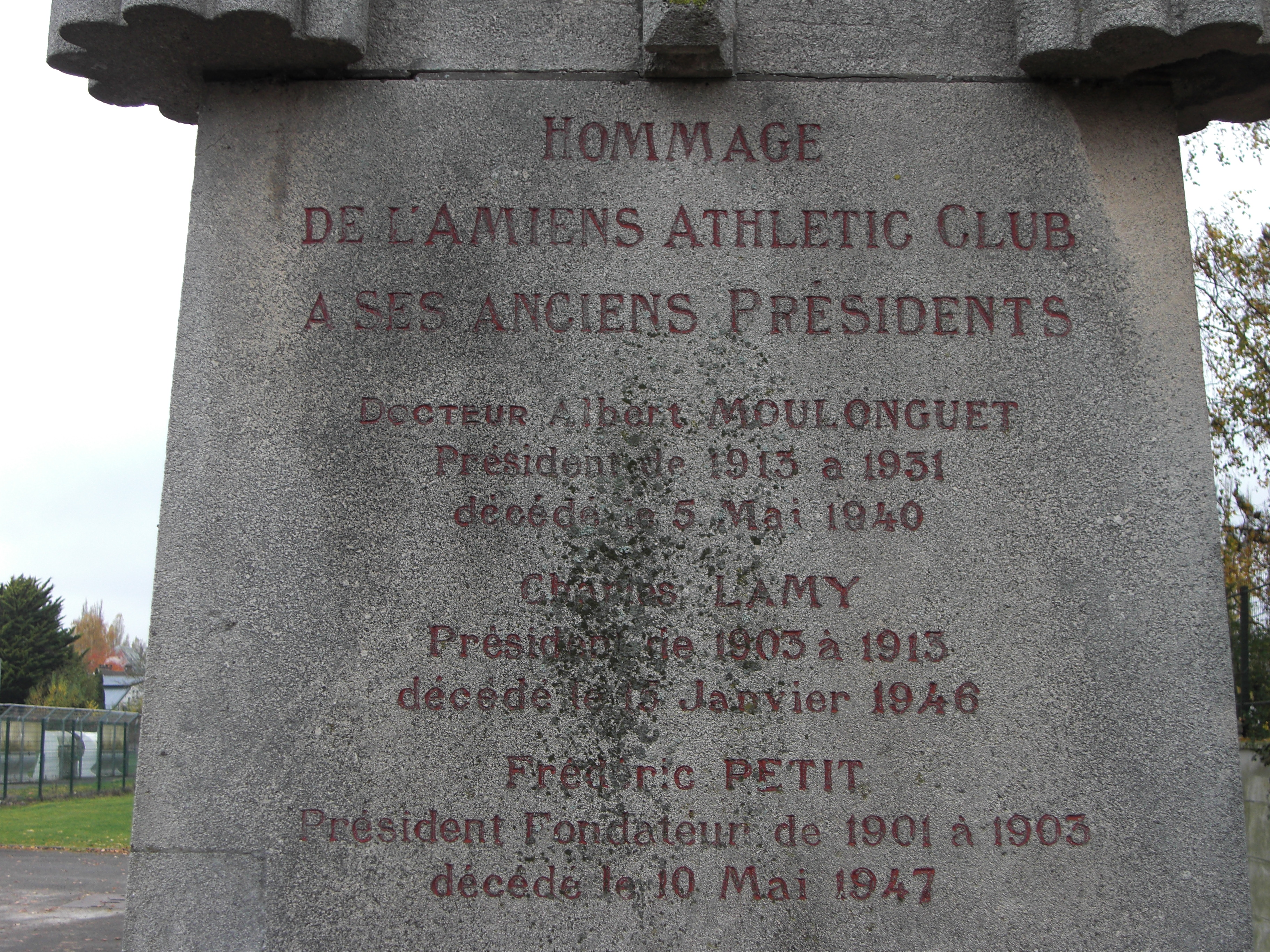 Plaque commémorrant les premiers présidents de l'Amiens Athlétic Club